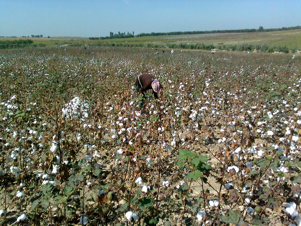 Ручной сбор хлопка (Бука, Ташкенсткий область, Узбекистан)